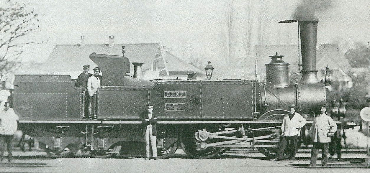 Die Ec 2/5 Nr. 28 "Genf", Die Ausnahme stamt aus dem Jahr 1890 und zeigt vermutlich den Endzustand der Lokomotive vor ihrer Ausrangierung 1898 (Lokomtive blieb erhalten)